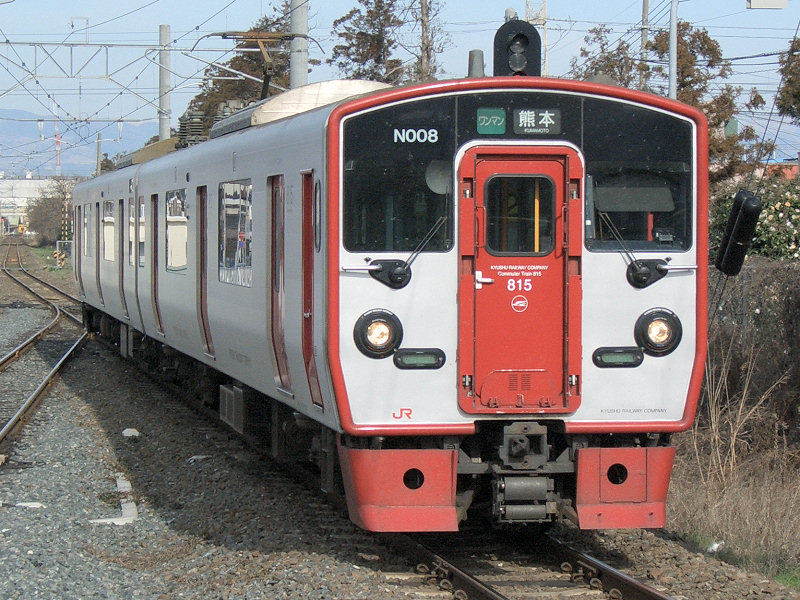 JR九州815系電車 車両デザイン : 水戸岡鋭治 撮影場所 : 光の森駅 撮影者/著者/著作権保有者 : MK Products (本人がアップロード) 撮影日 : 2007/03/02 JR九州815系電車用にアップロードした画像です。良い画像があれば別の画像に変えてください。